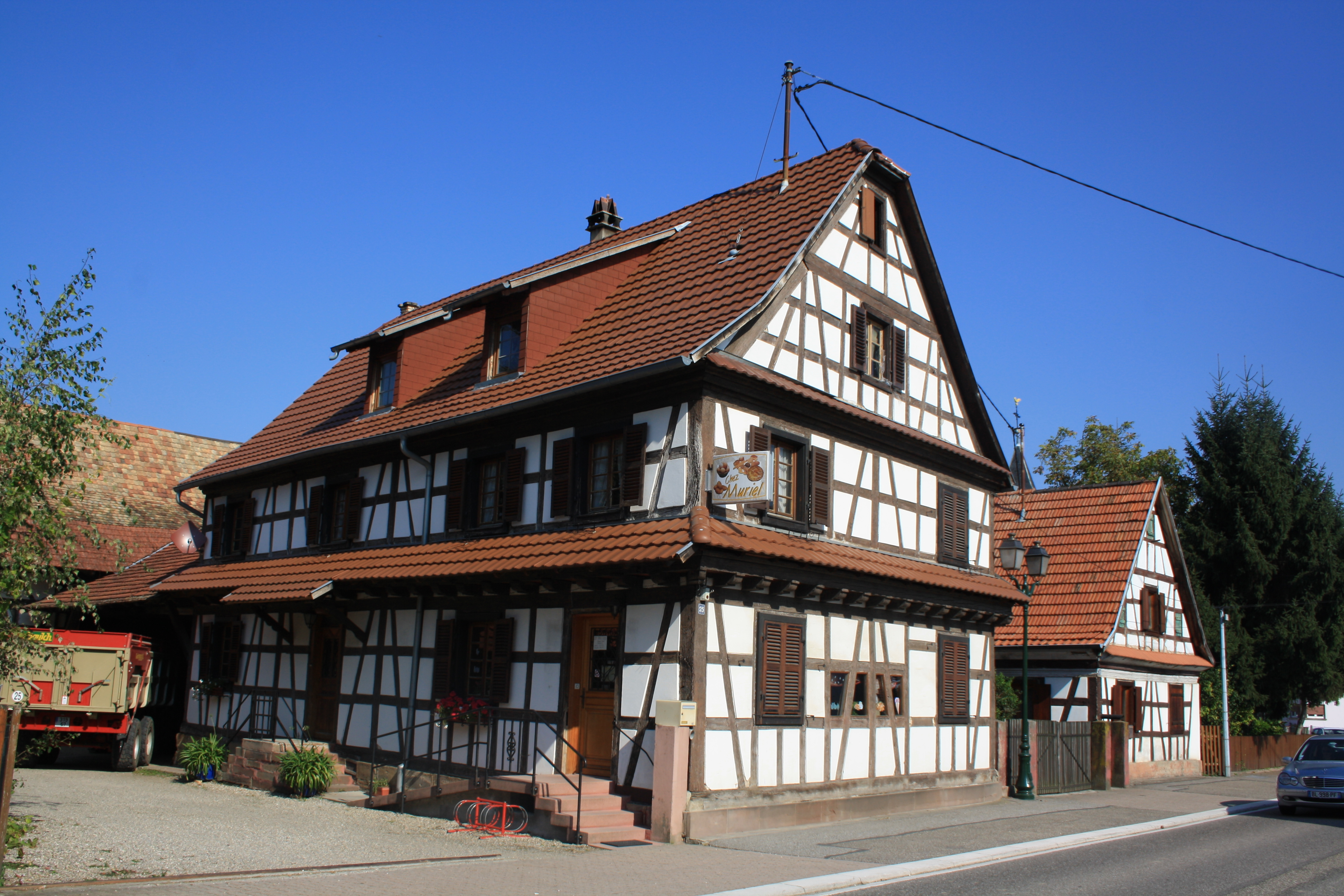 Roppenheim, Alsace